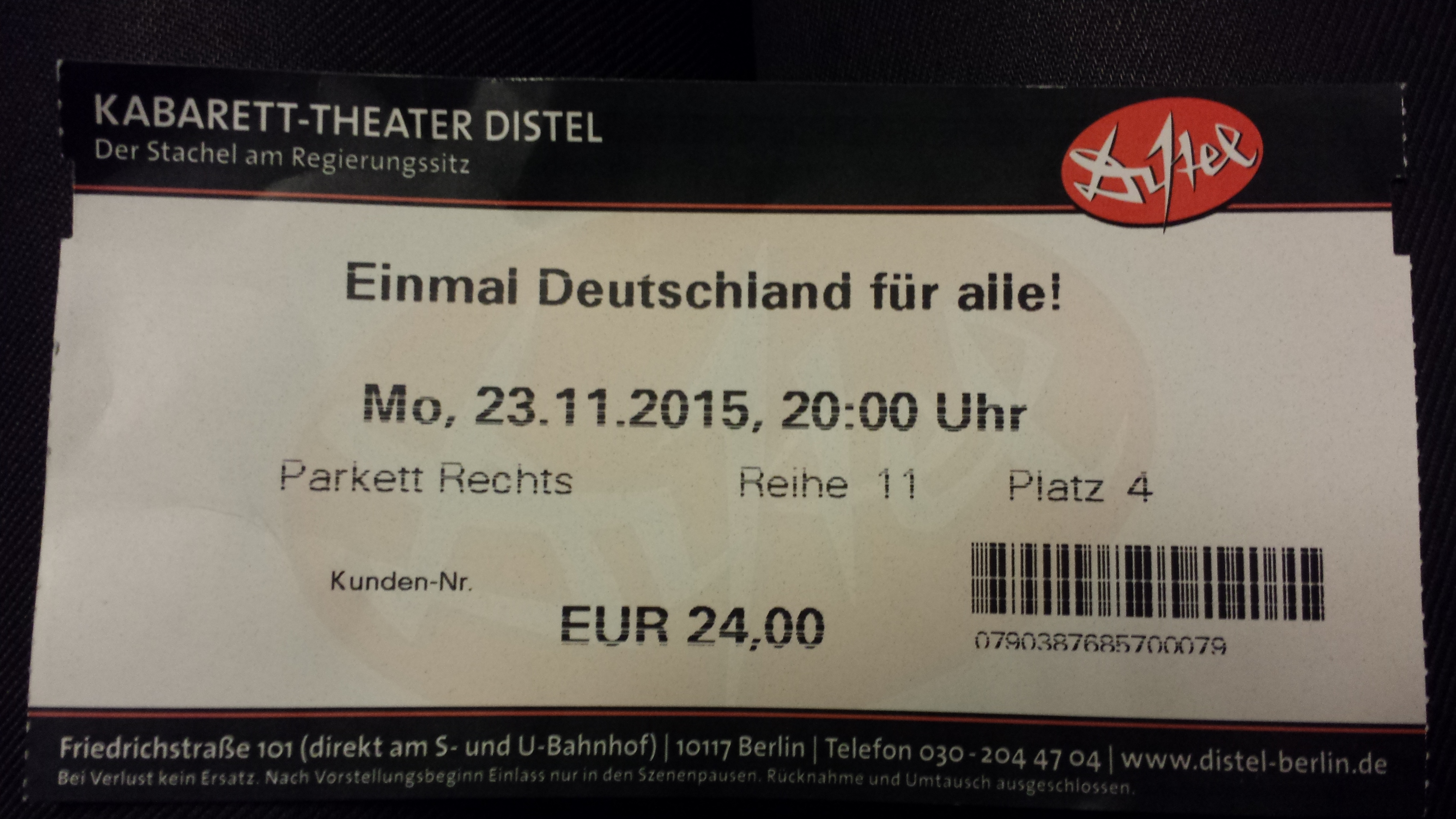 Ein Ticket für das 138. Programm im Kabarett-Theater Distel mit dem Titel „Einmal Deutschland für alle!“ Es handelt sich um die Vorstellung um 20:15 Uhr vom Montag, den 23. November 2015. Die offizielle Premiere des 138. Programms fand am 29. Oktober 2015 statt.